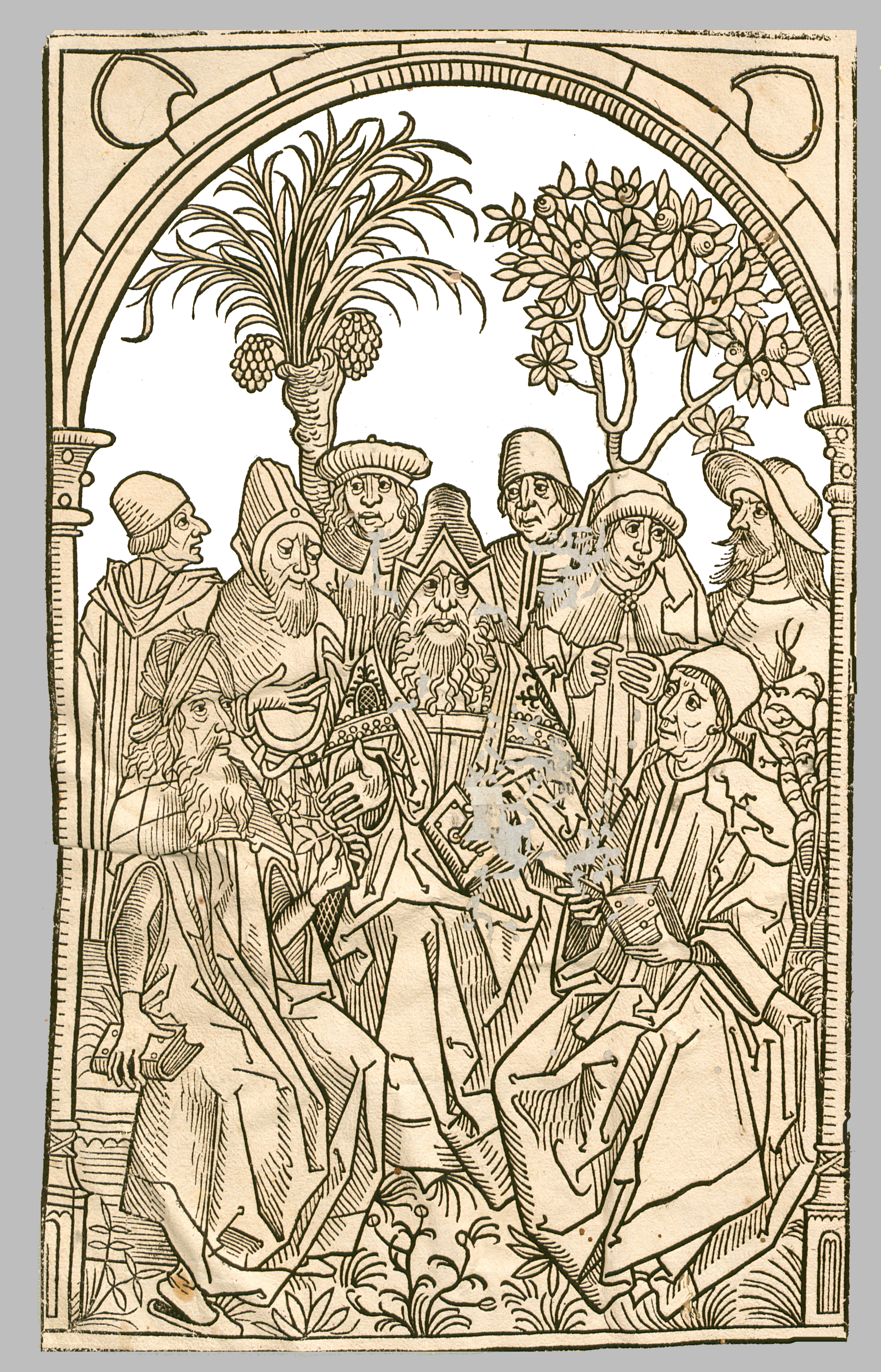 Titelblatt